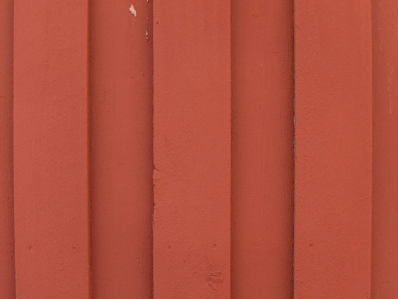 Ossenbloed op een Noors huis.